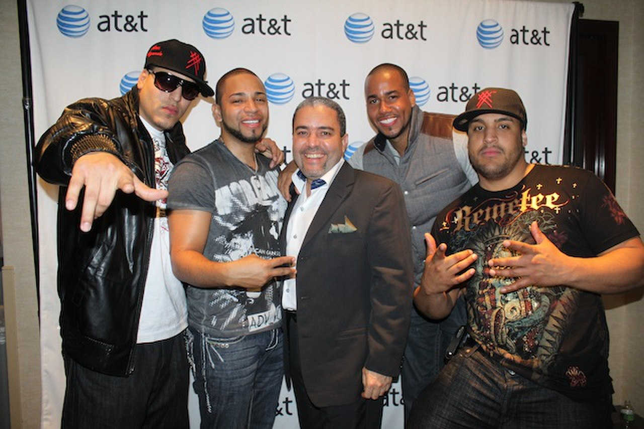 Aventura, agrupación musical dominico-estadounidense.